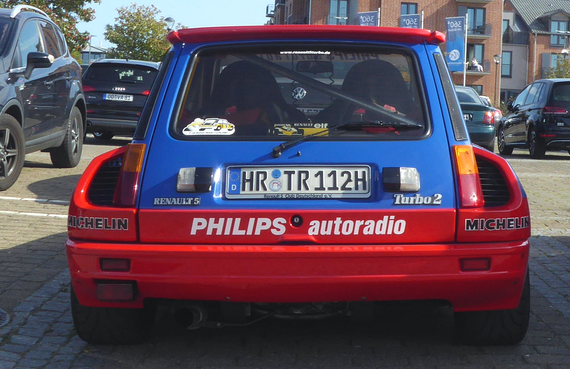 Renault R5 turbo 2 mid-engine 118 KW 160 pk achterwielaandrijving - 1980-86 - Foto 2018 © Wolfgang Pehlemann P1270392